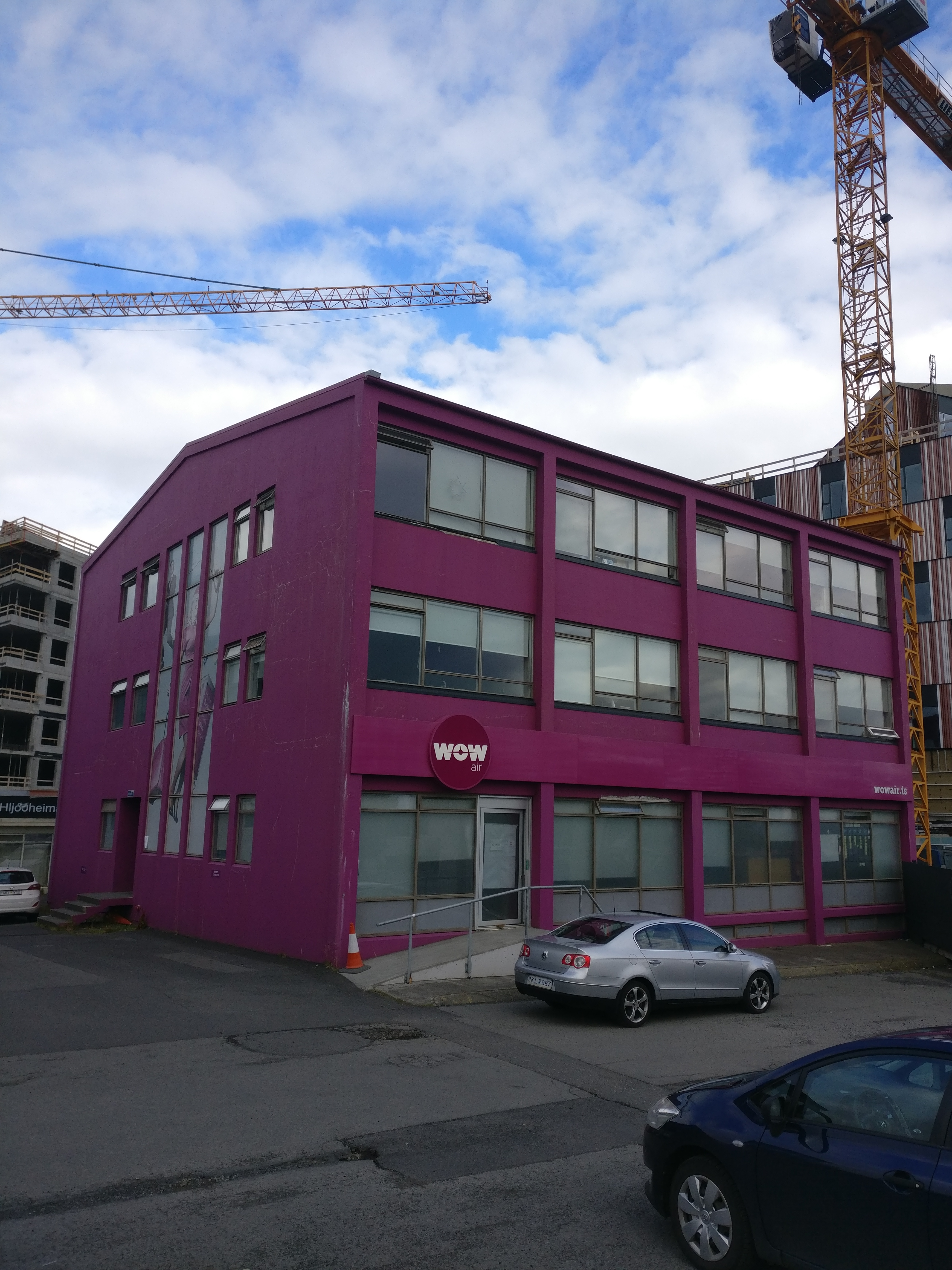 Bríetartún 13 - 105 Reykjavik